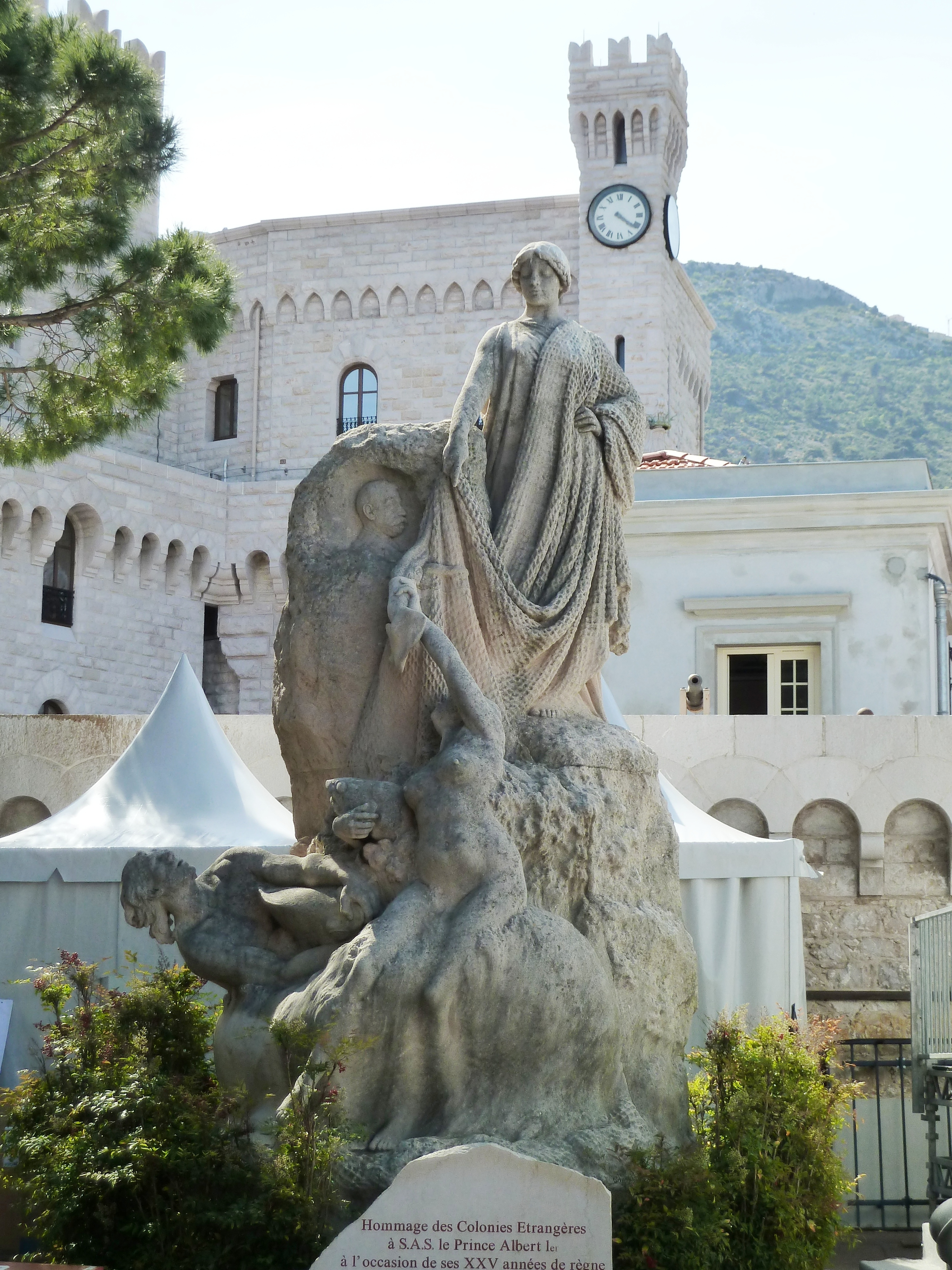 palais princier Monaco. Statue réalisée par Constant Roux appelée La science découvrant la richesse de l'océan